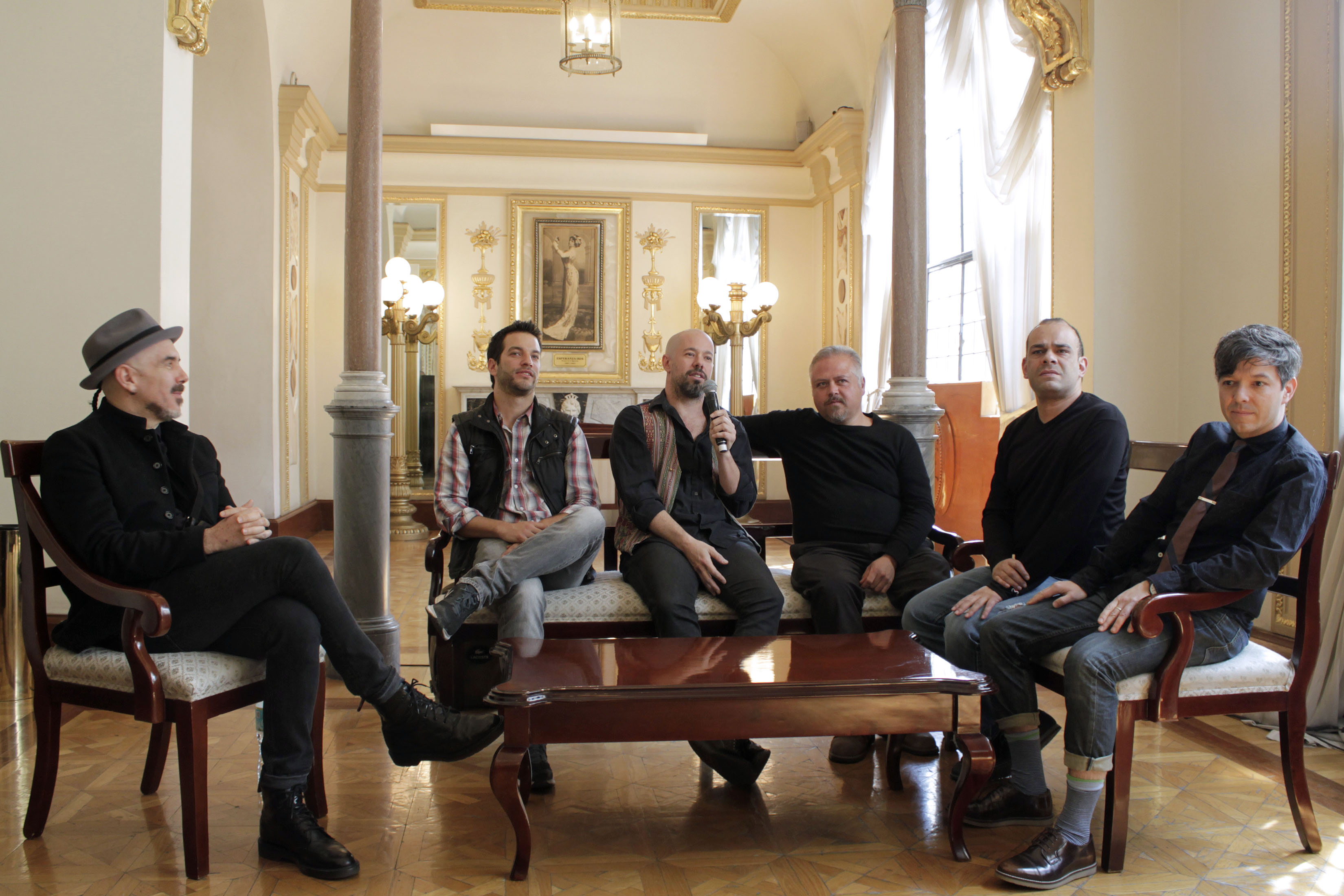 Miércoles, 11 de Febrero del 2015. Conferencia de prensa en el Teatro de la Ciudad Esperanza Iris para anunciar el concierto Azul Casi morado del grupo Santa Sabina. Foto: Viridiana Palomino / Secretaría de Cultura CDMX.